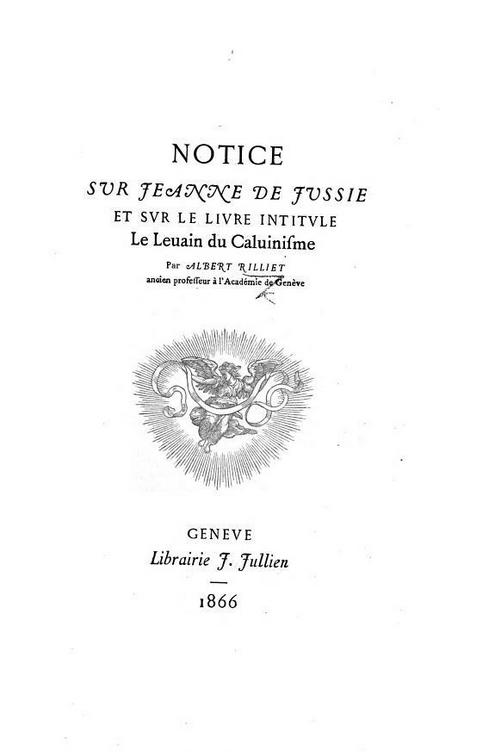 Albert Rilliet, Notice sur Jeanne de Jussie et sur le livre intitulé "Le Levain du Calvinisme"